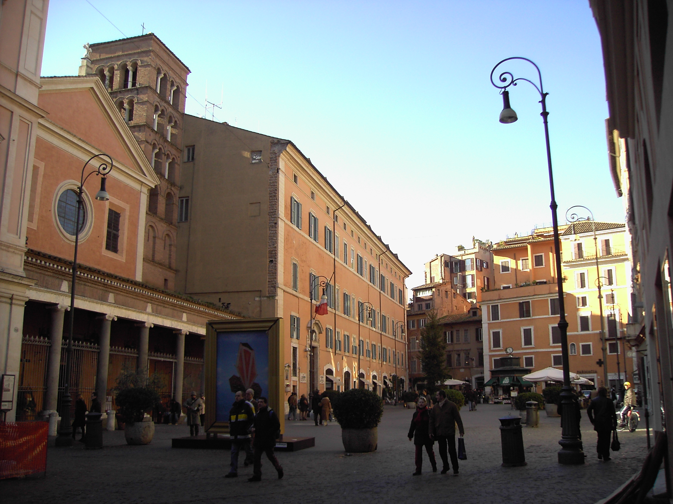 Roma: piazza in Lucina e chiesa di S. Lorenzo in Lucina